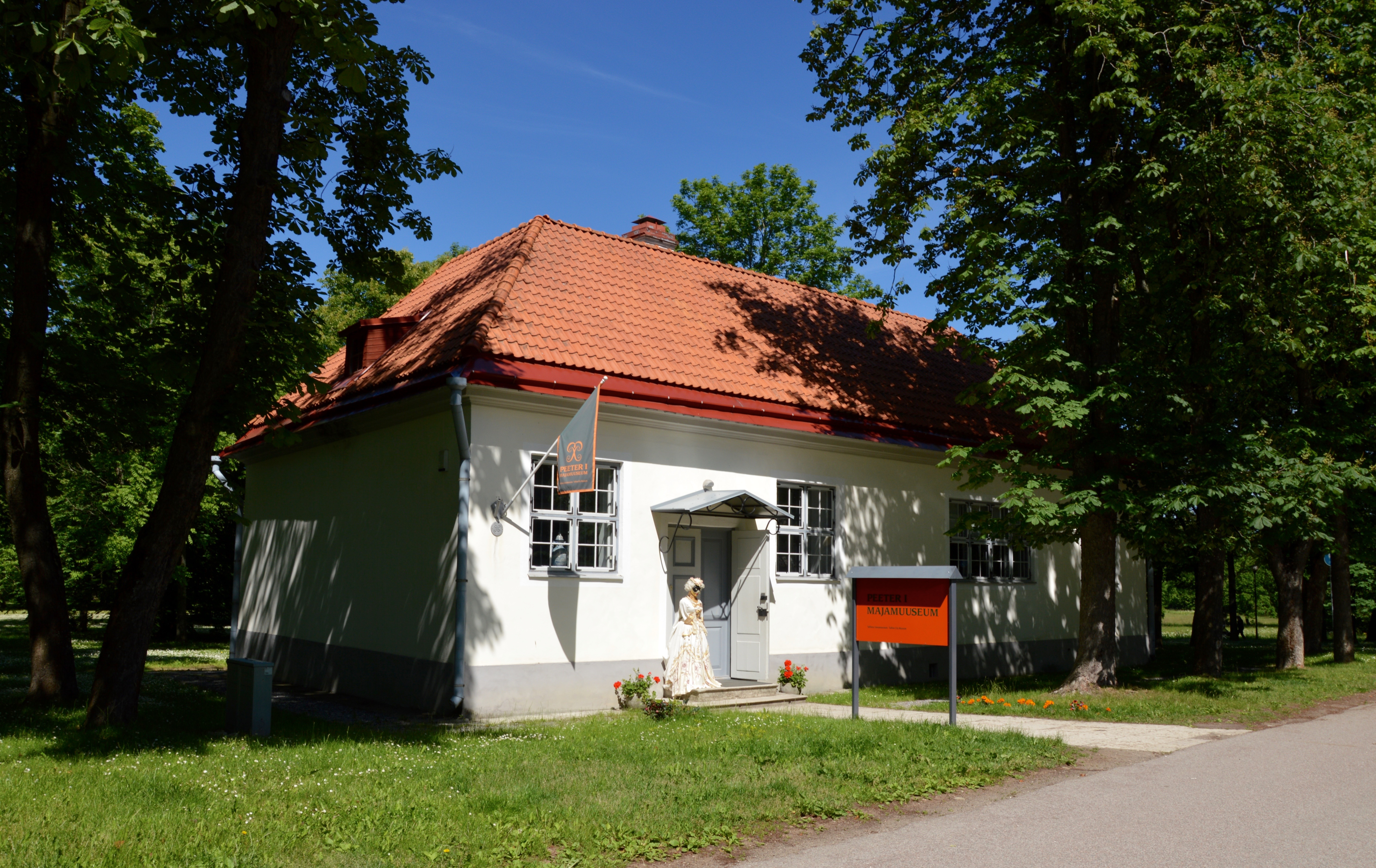 Peter the Great House Museum in Tallinn